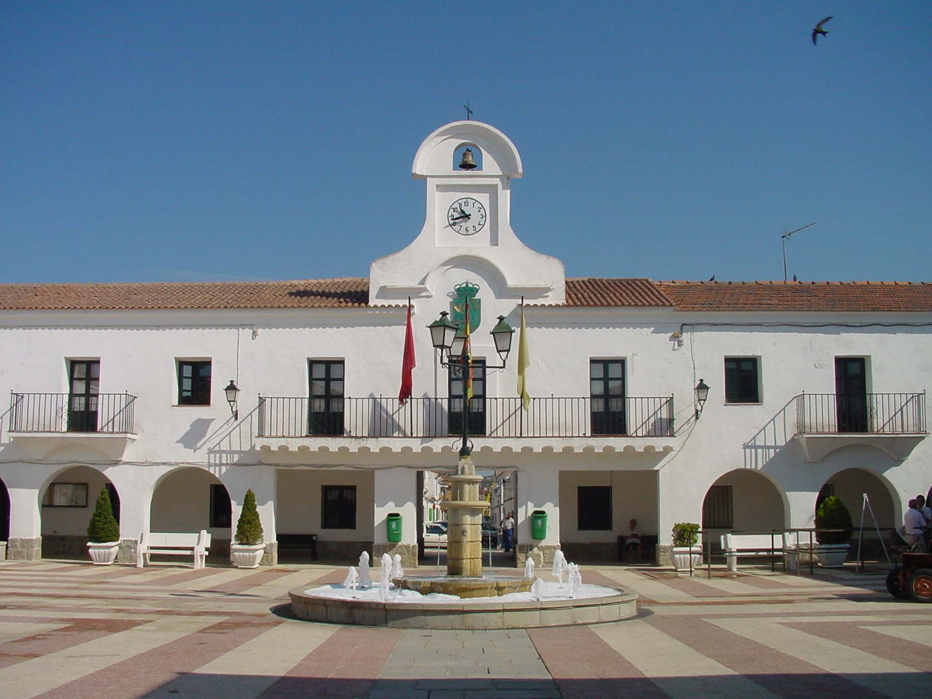 Ayuntamiento de Villanueva del Pardillo.